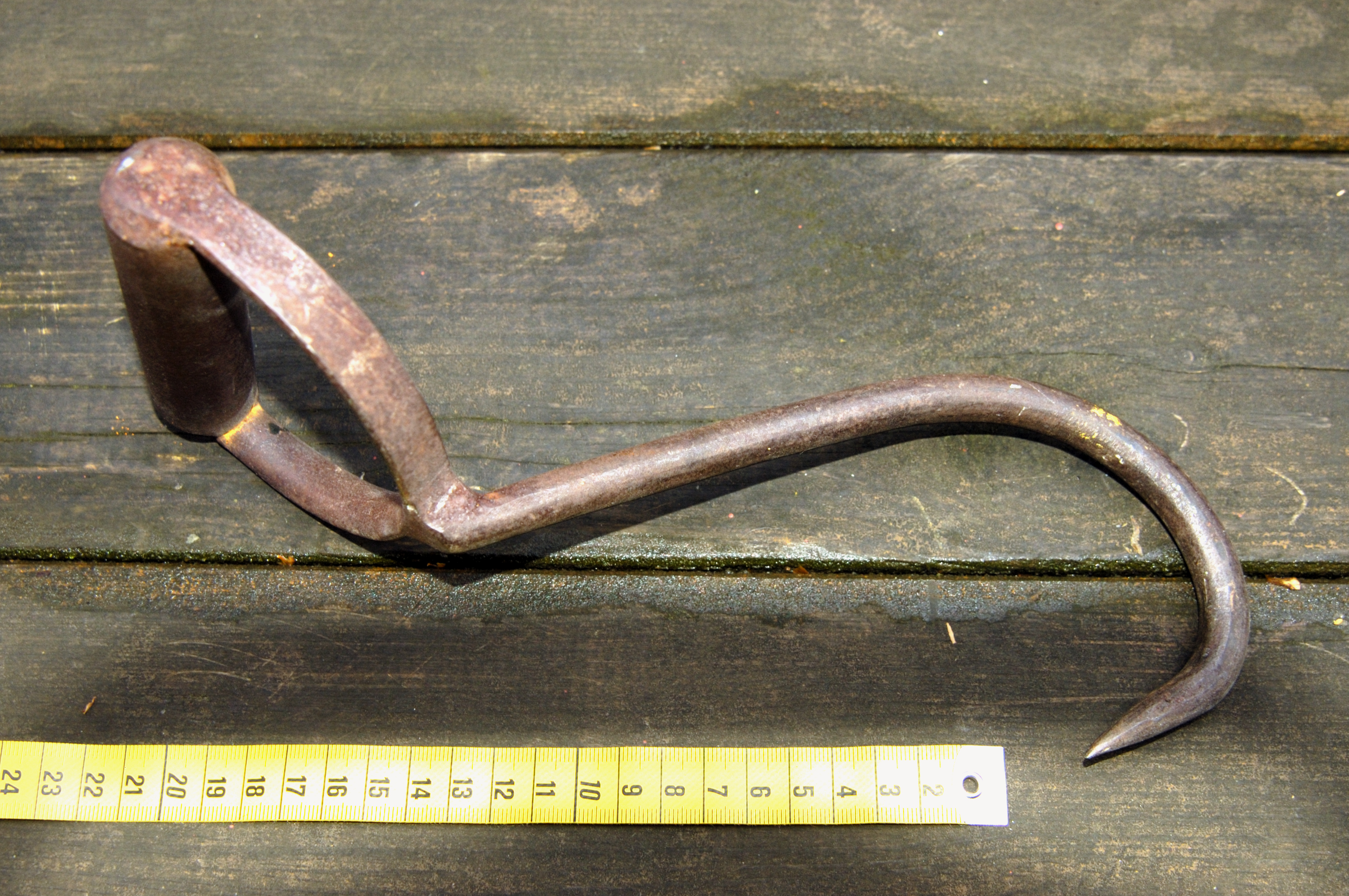 Handhaken, Maßband zum Größenvergleich